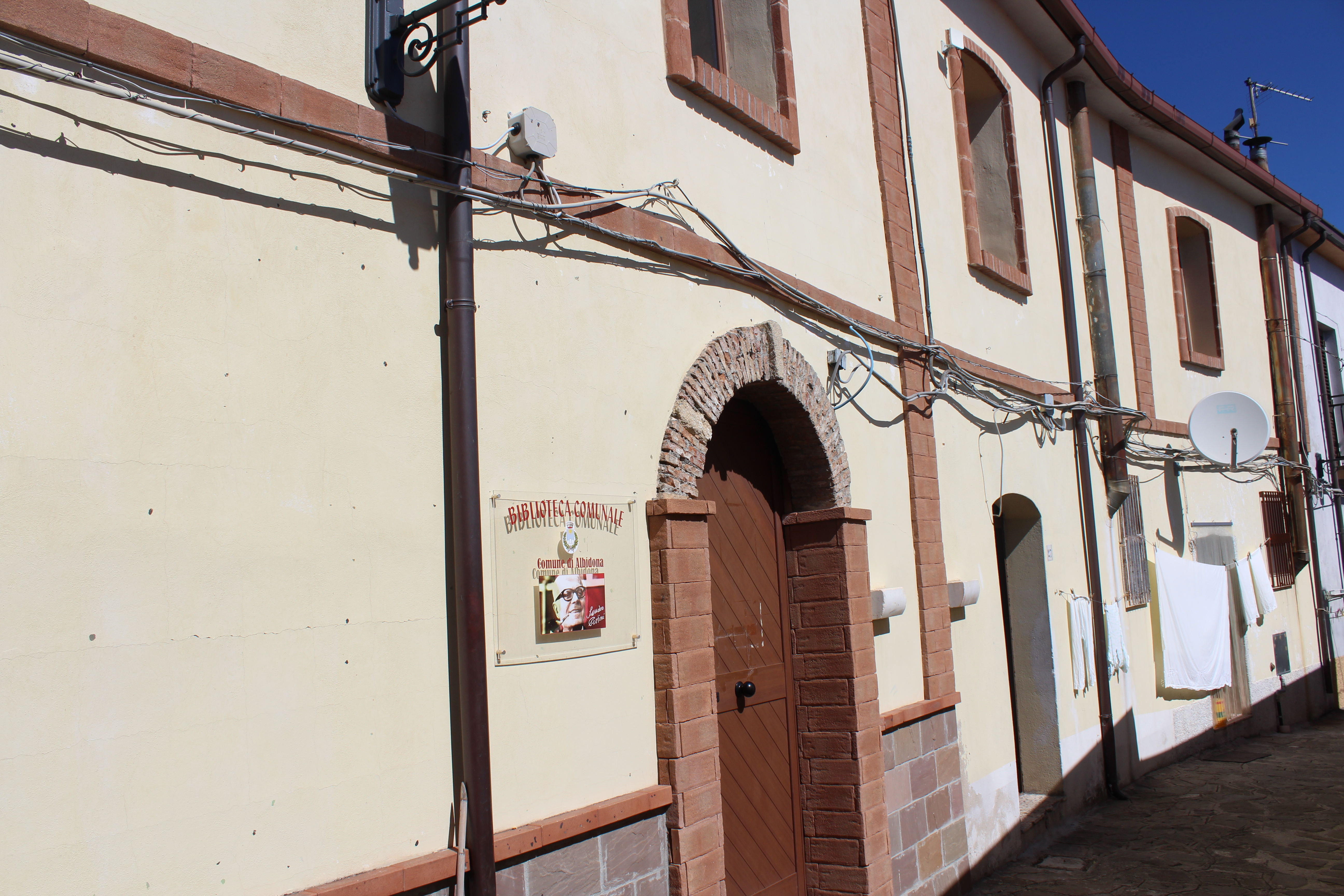 Biblioteca comunale "S. Pertini" (Albidona)